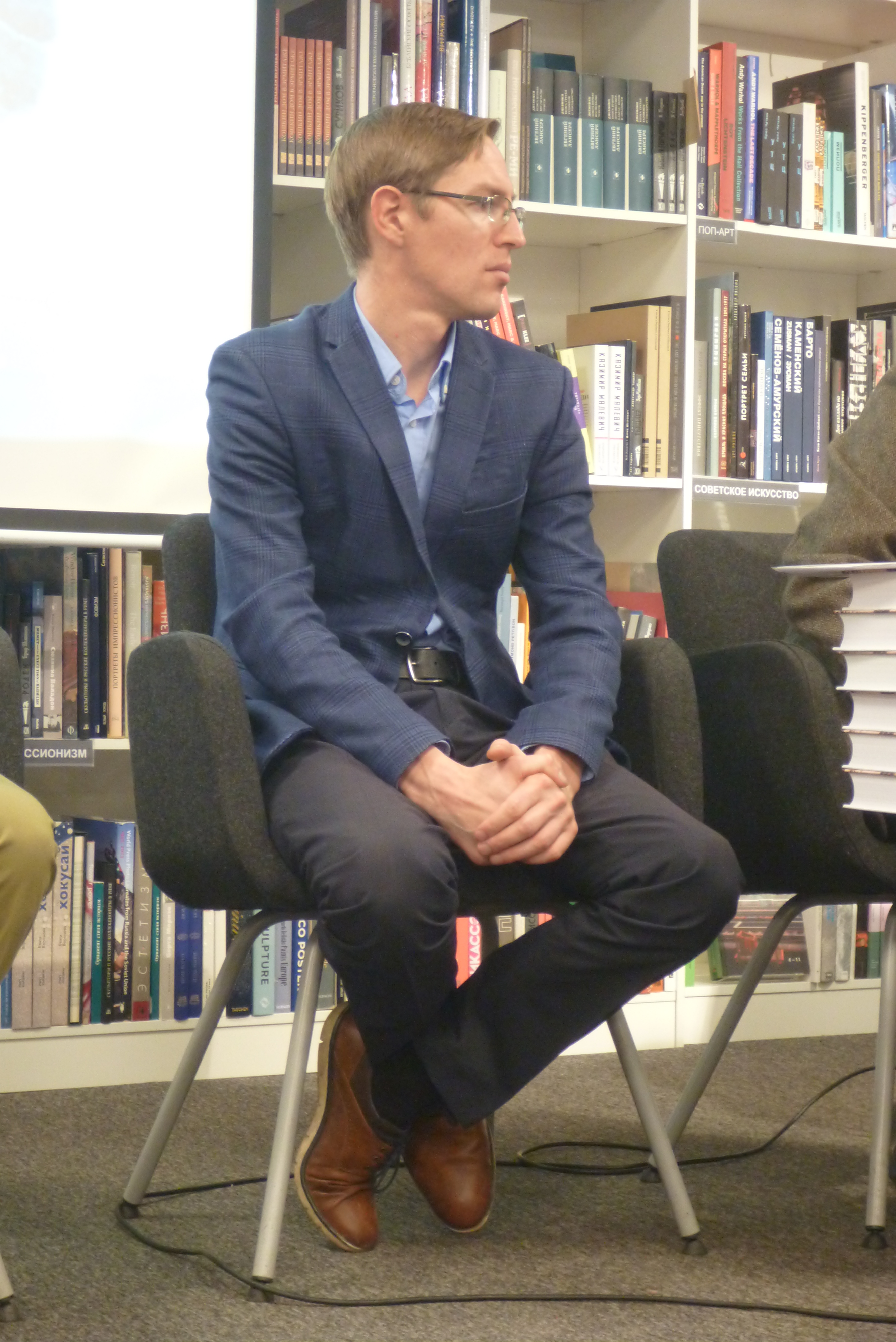 Сергей Юрьевич Каменский, директор музея истории Екатеринбурга. 9 ноября 2018 года. Ельцин-центр, Екатеринбург